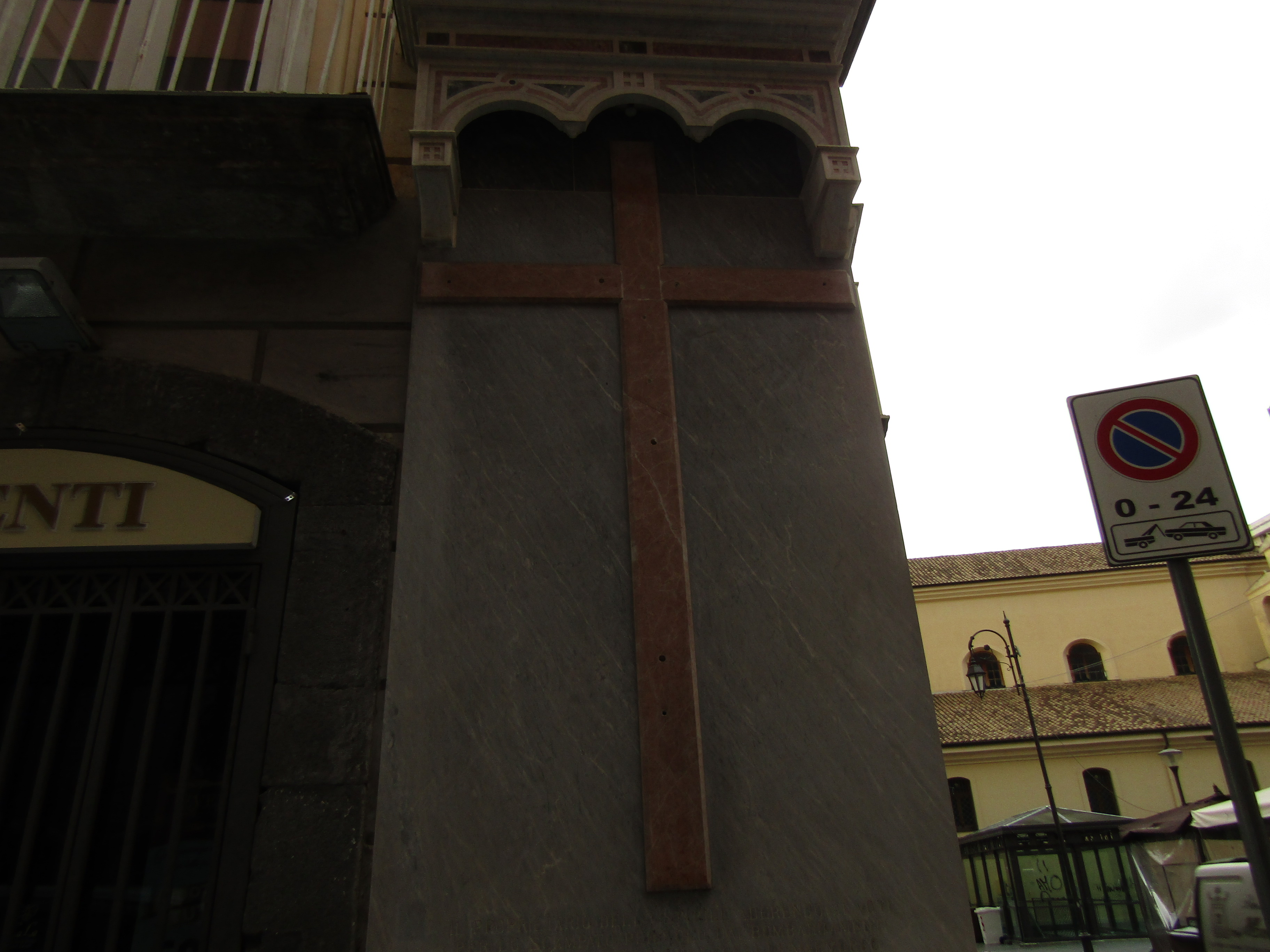 Template:Informazioni file